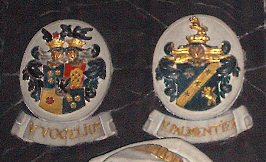 Wappen vom Epitaph des Ignatius Ferdinand von Vogelius (1740-1784), kurkölnischer Geheimer Rat, Ortsherr zu Wattenheim, Pfalz, in der Liebfrauenkirche zu Worms